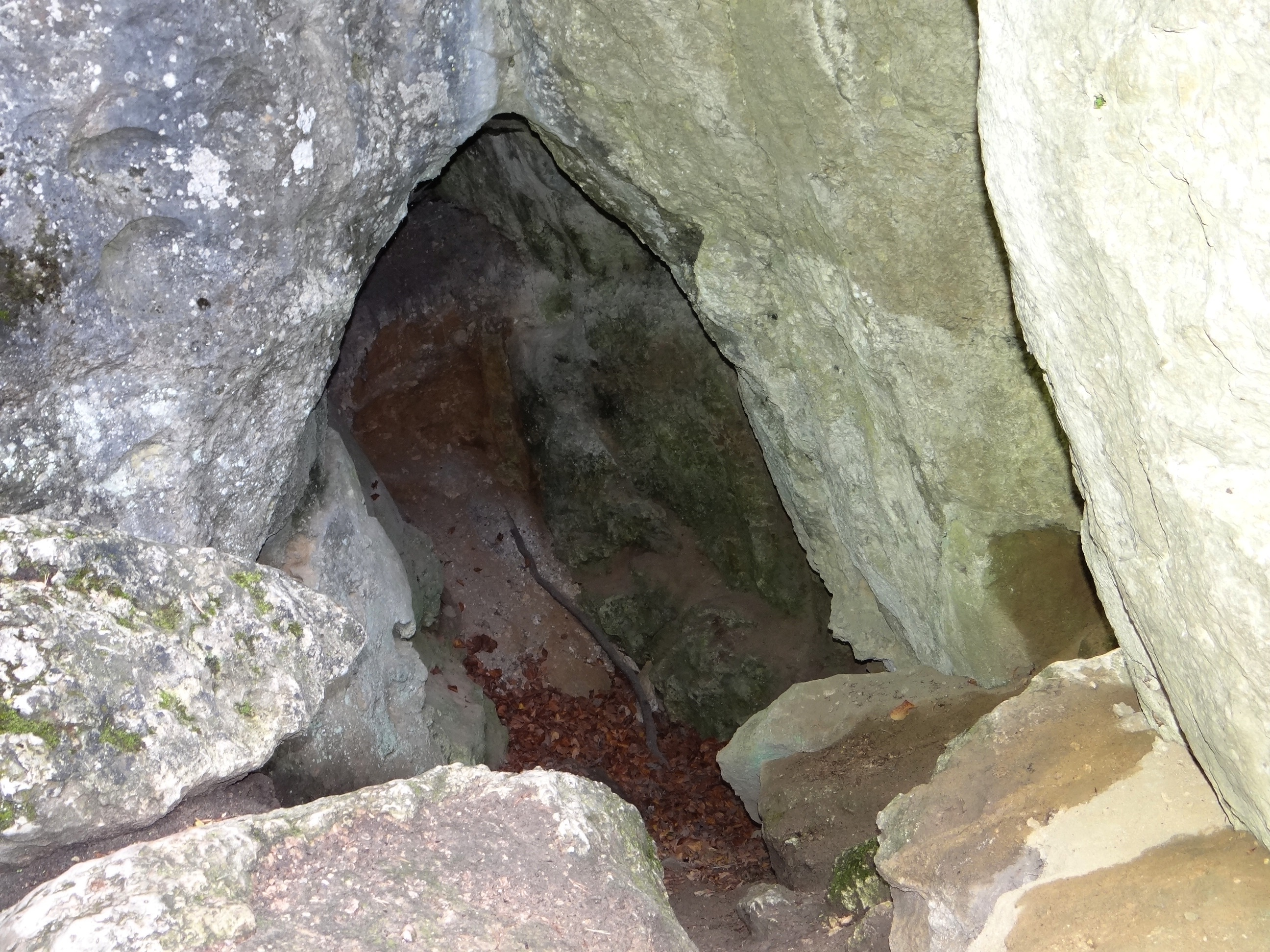 Schronisko w Krużganku na Górze Popielowej w na Wyżynie Częstochowskiej